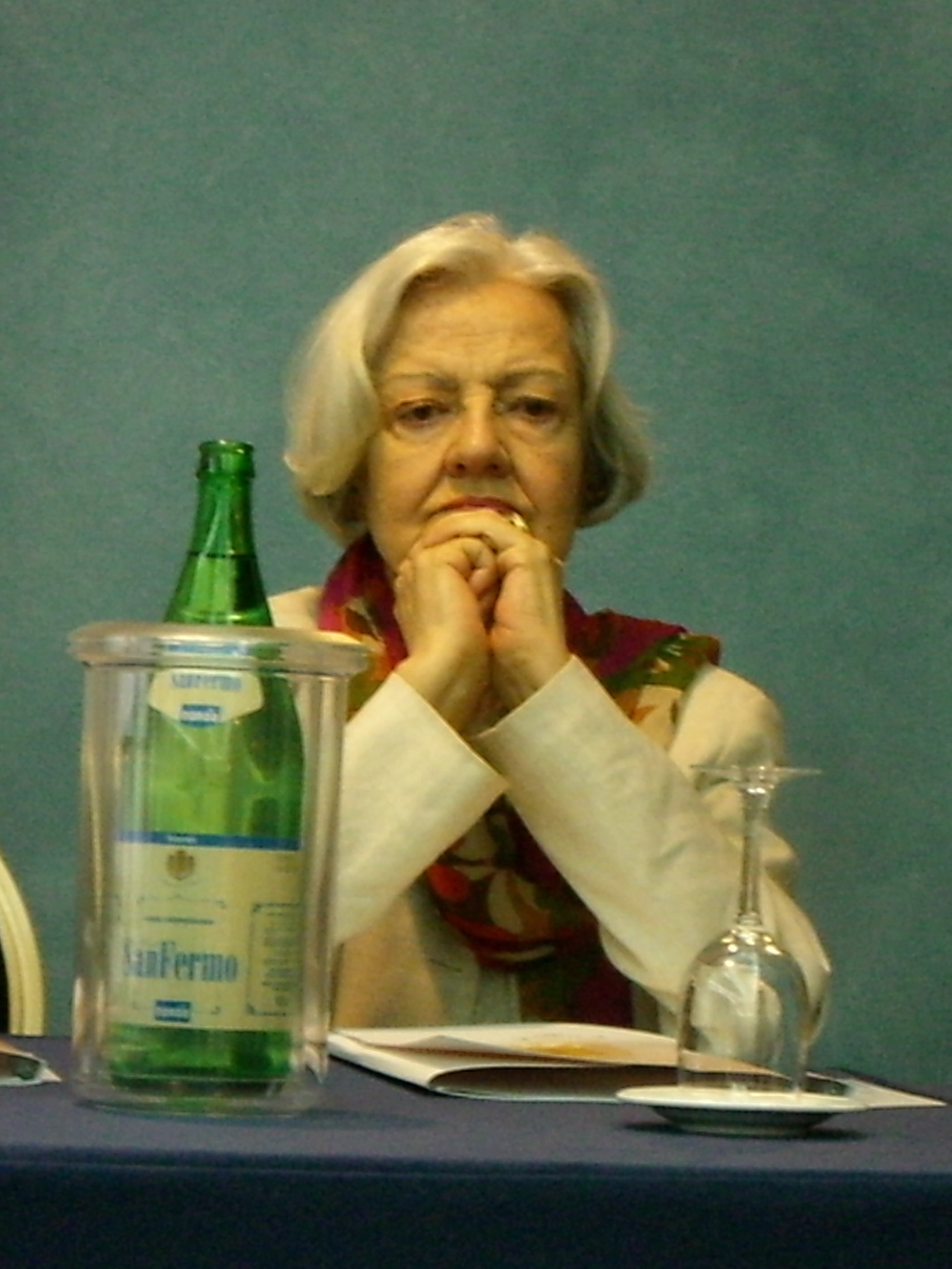 La scrittrice italiana Francesca Sanvitale